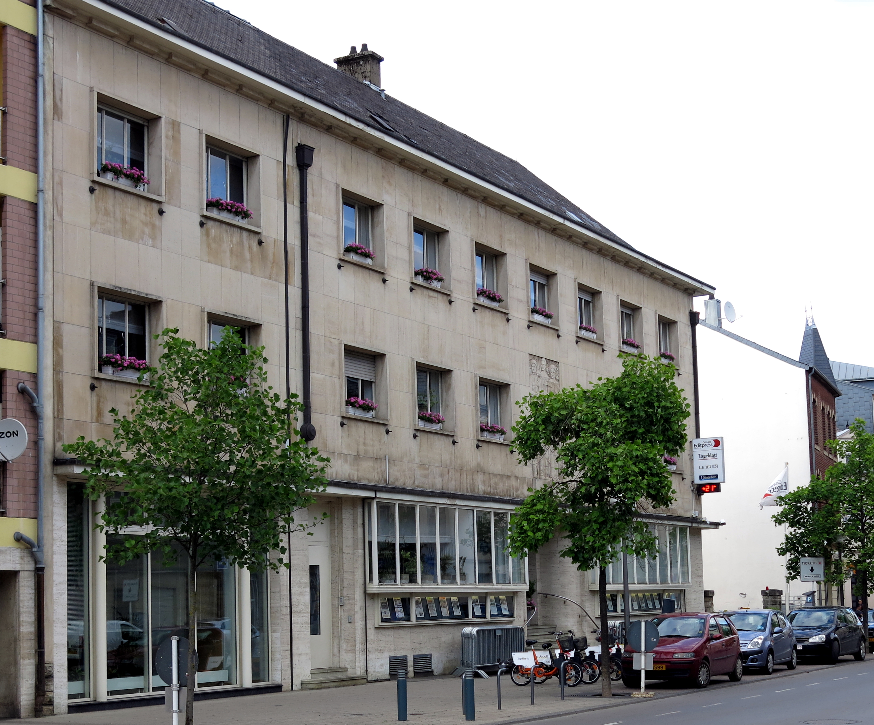 D'Gebai vum Tageblatt, Kanalstrooss 44 zu Esch.